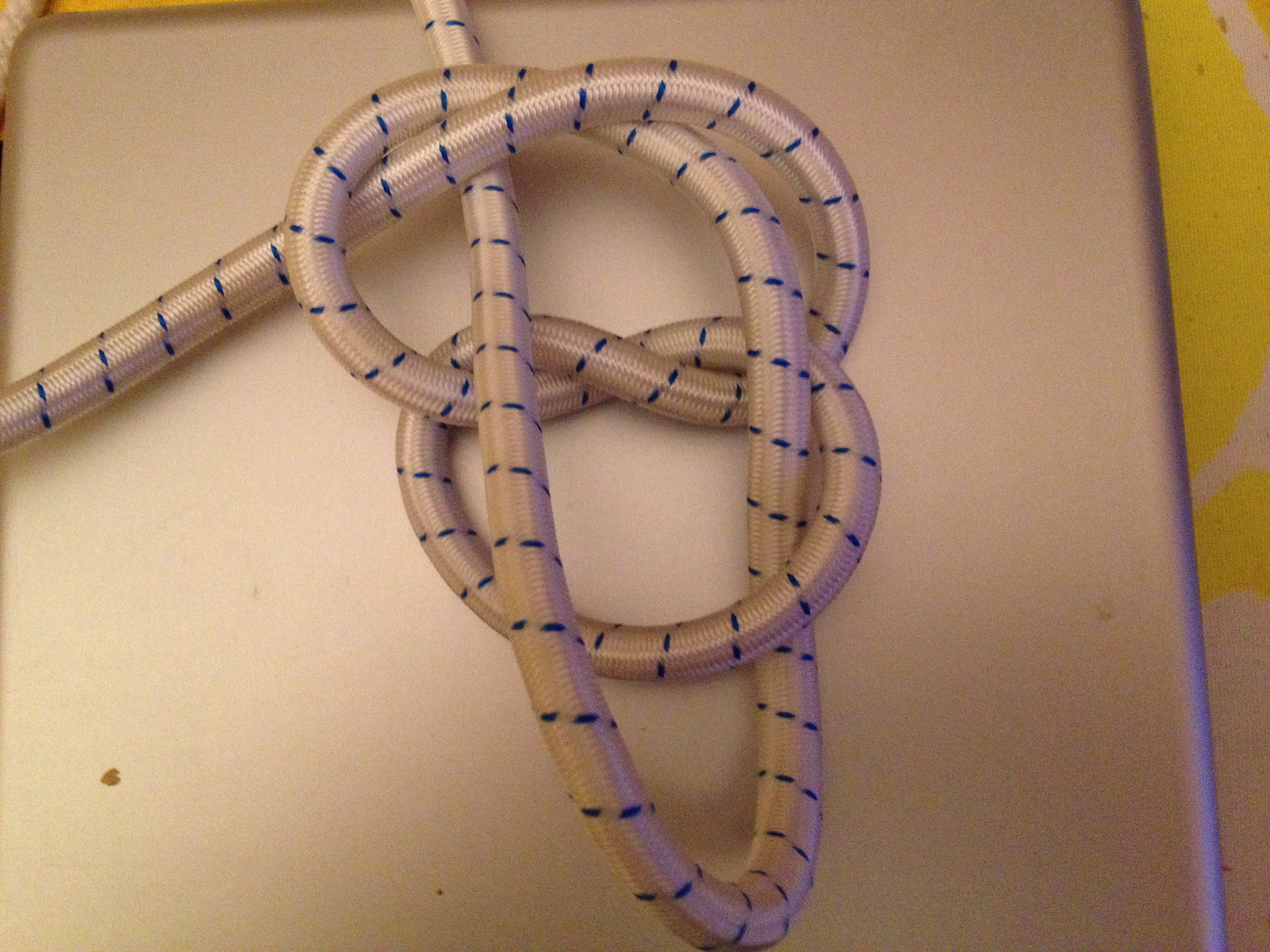 4=0 düğümü 4. adım Sağ uç üstteki camadan bağının orta deliğinden arkaya.